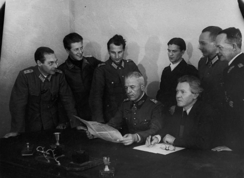 ADN / Sowjetunion: Sitzung des Nationalkommites "Freies Deutschland" Sitzend rechts: Erich Weinert, Präsident des Komitees, links daneben: General der Artillerie von Seydlitz Abgebildete Personen: Weinert, Erich: Schriftsteller, Gründungsmitglied der Akademie der Künste (AdK), Präsident des Nationalkomitees Freies Deutschland (NKFD), Nationalpreis 1949, 1952, DDR Seydlitz-Kurzbach, Walther von: General der Artillerie, Ritterkreuz (RK), Heer, Vorsitzender des Bunds Deutscher Offiziere, Nationalkomitee Freies Deutschland (NKFD), Bundesrepublik Deutschland (GND 118613626)